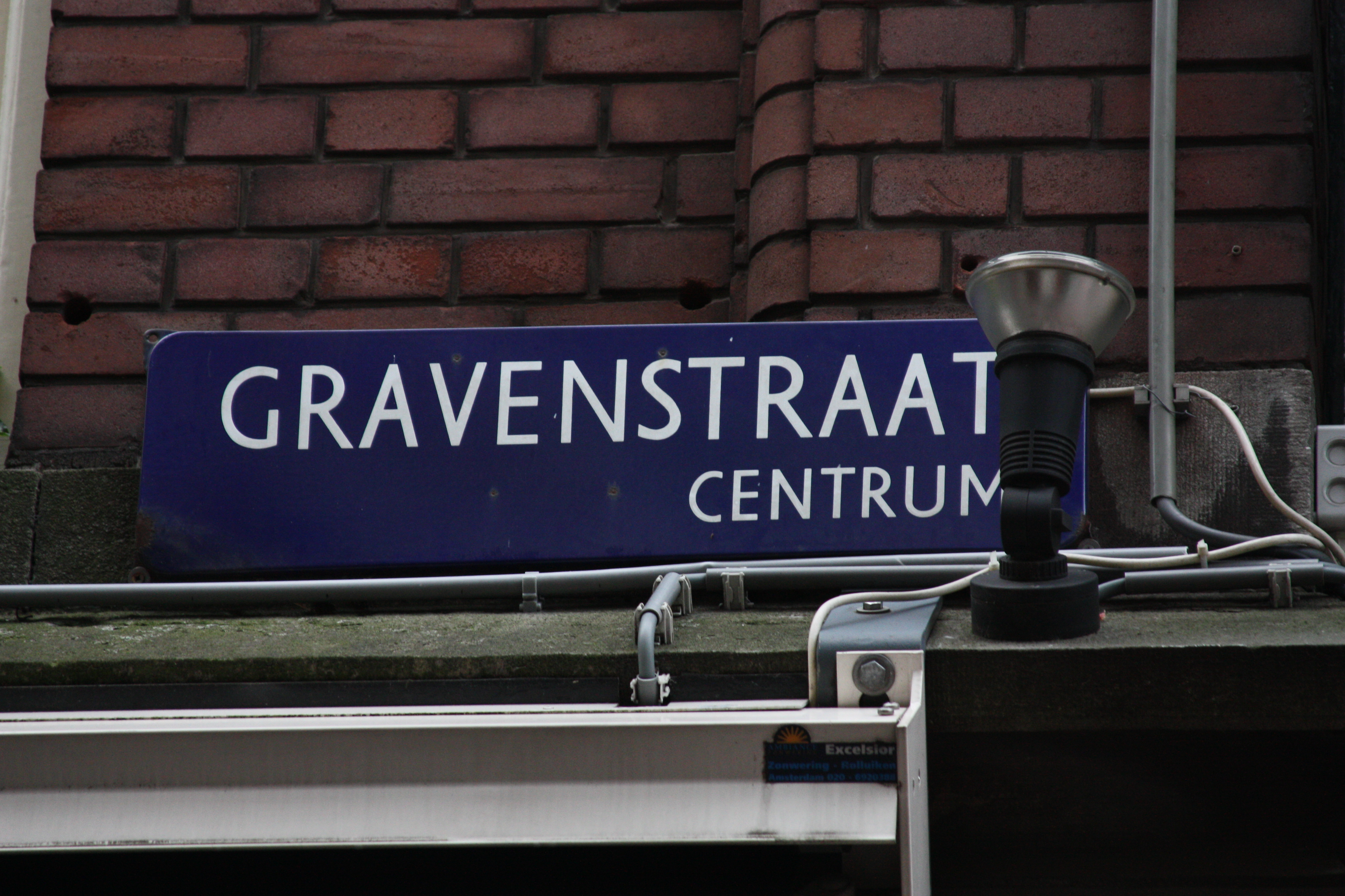 Amsterdam Zentrum